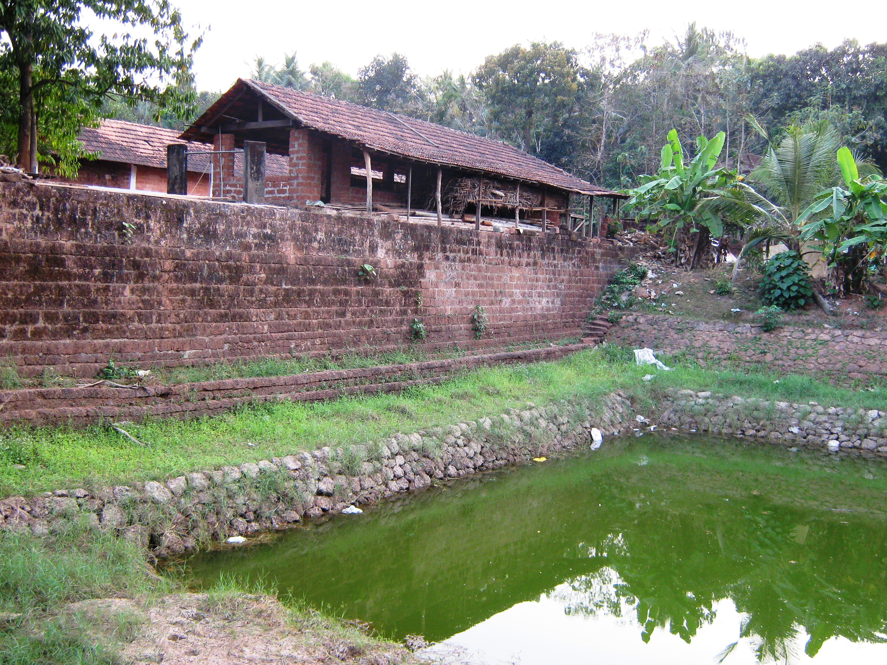 Taliparamba, Kerala, India